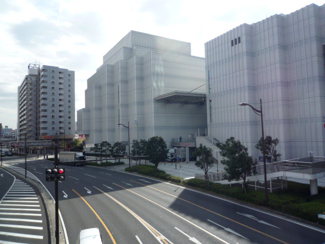 横須賀芸術劇場。国道16号線上の歩道橋から撮影。Panasonic Lumix DMC-FX35